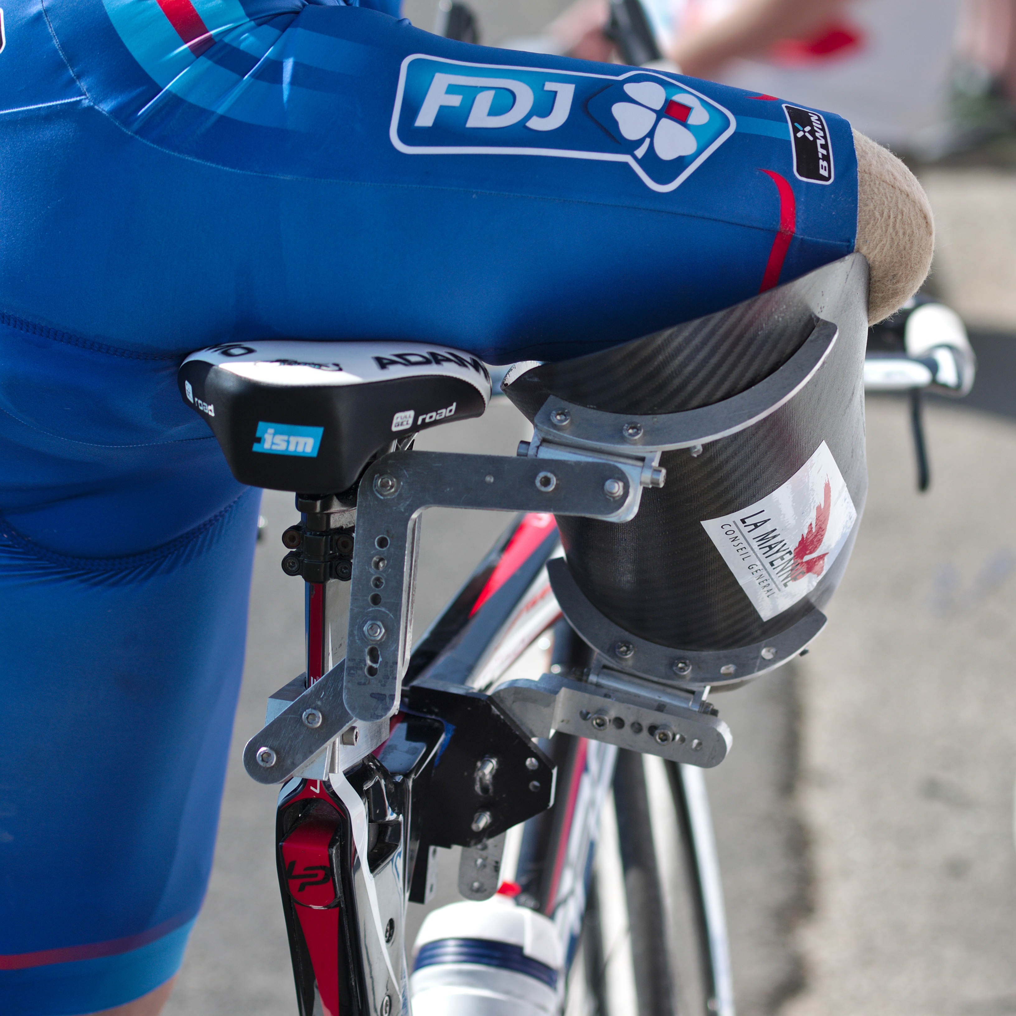 Championnat de France de cyclisme handisport - 20140615 - Contre la montre - Détails du vélo d'un concurrent amputé d'une jambe.